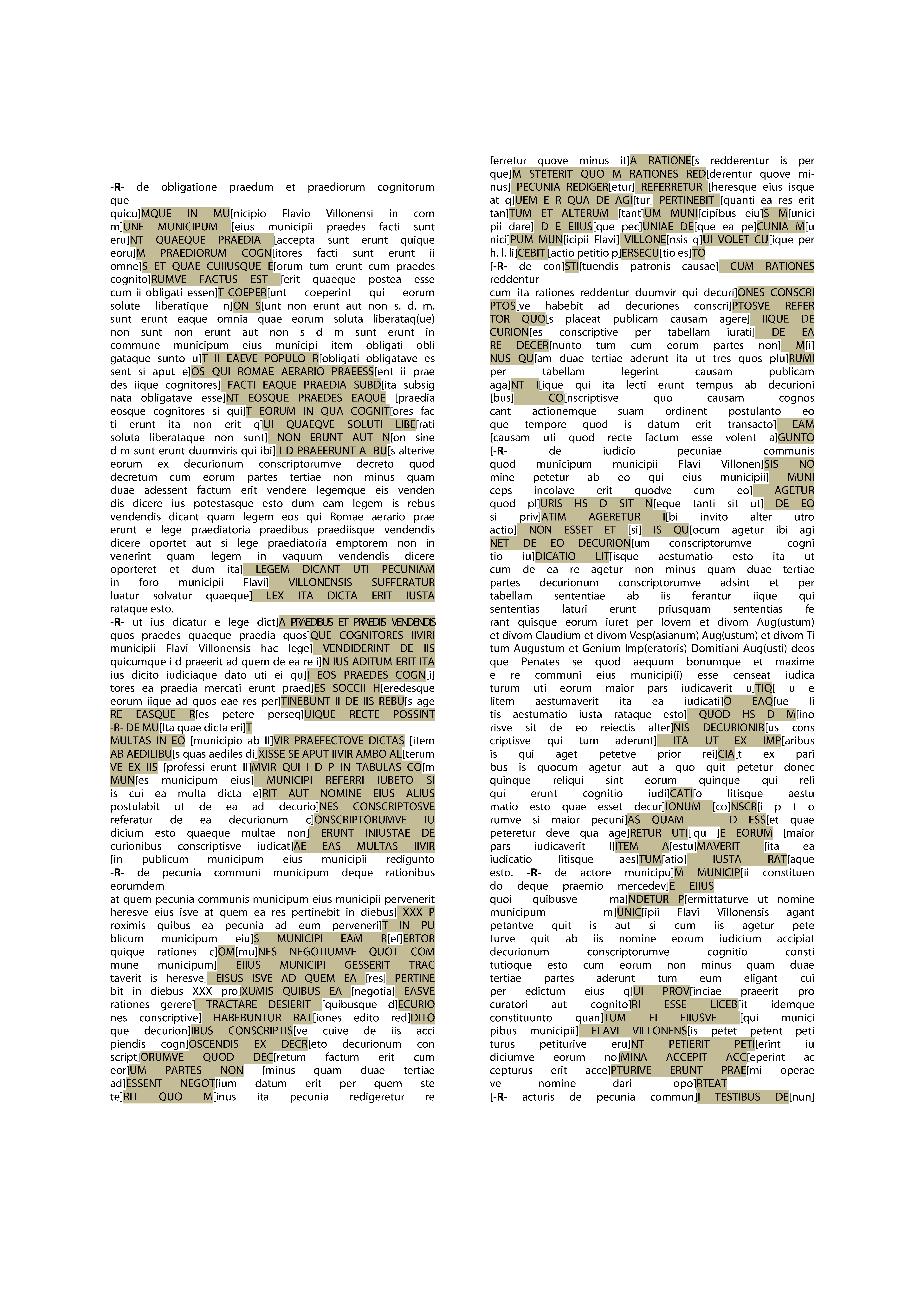 Visualisierung der zugeordneten Fragmente im transcribierten Text